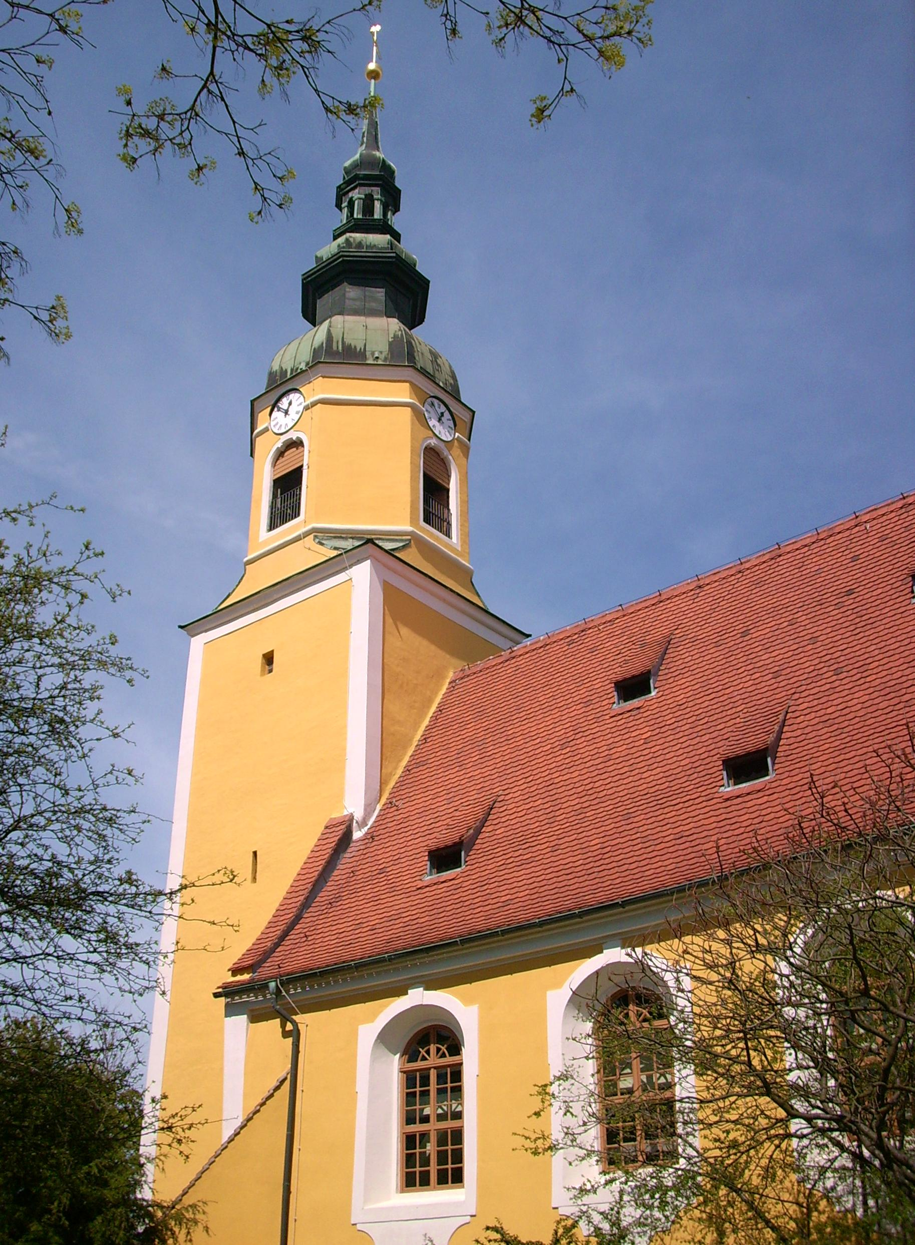 Kirche in Königswartha Hornjoserbsce: Ewangelska cyrkej w Rakecach